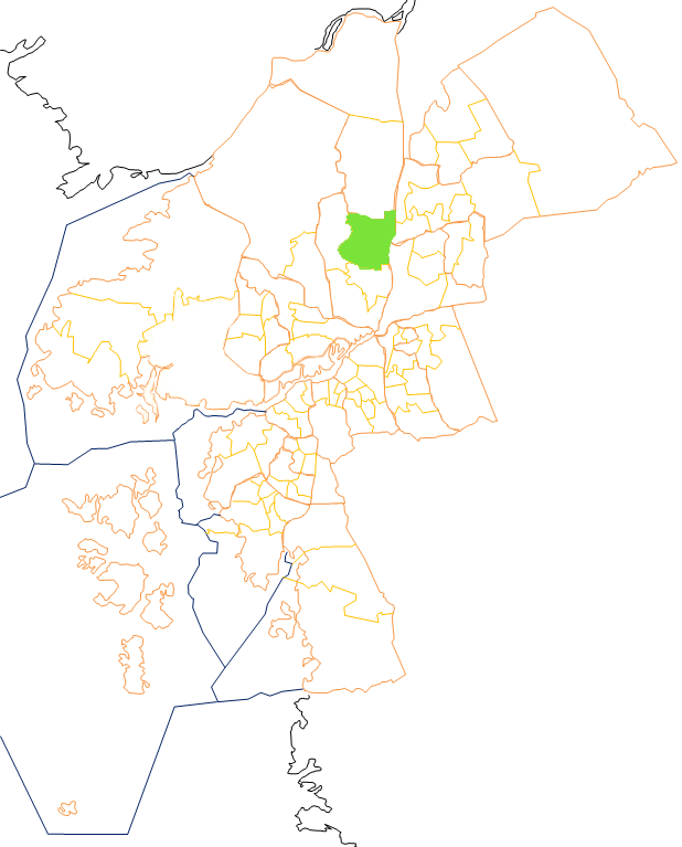 Karta som visar primärområdes belägenhet i Göteborg